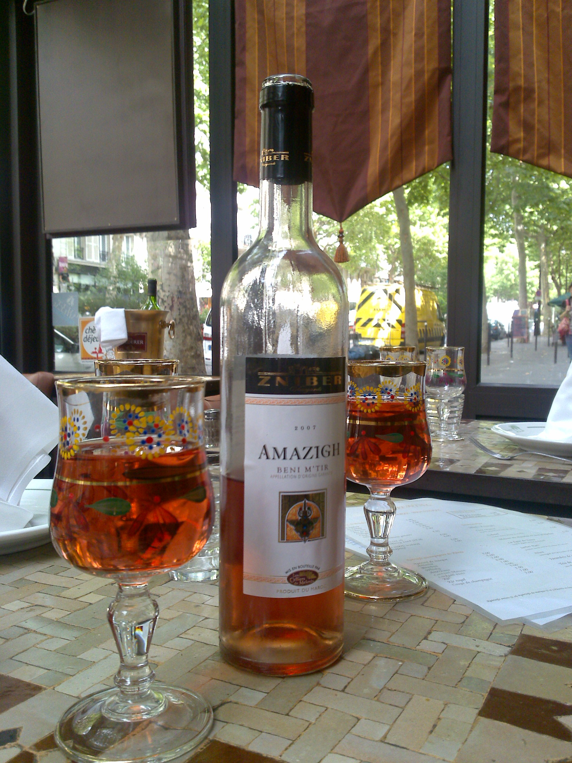 Rosé Amazigh M'tir